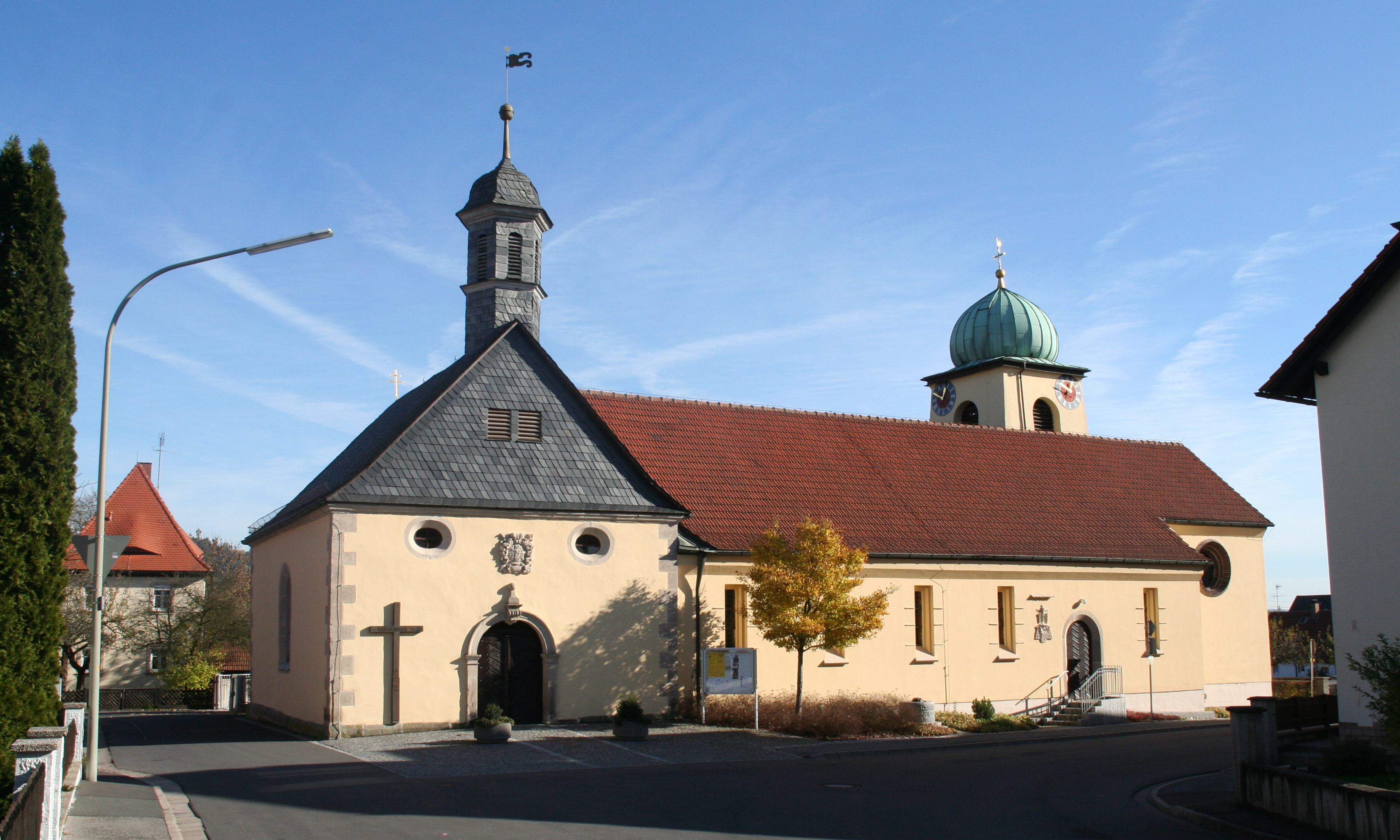 Katholische Kirche St.Wolfgang in Stockheim in Oberfranken